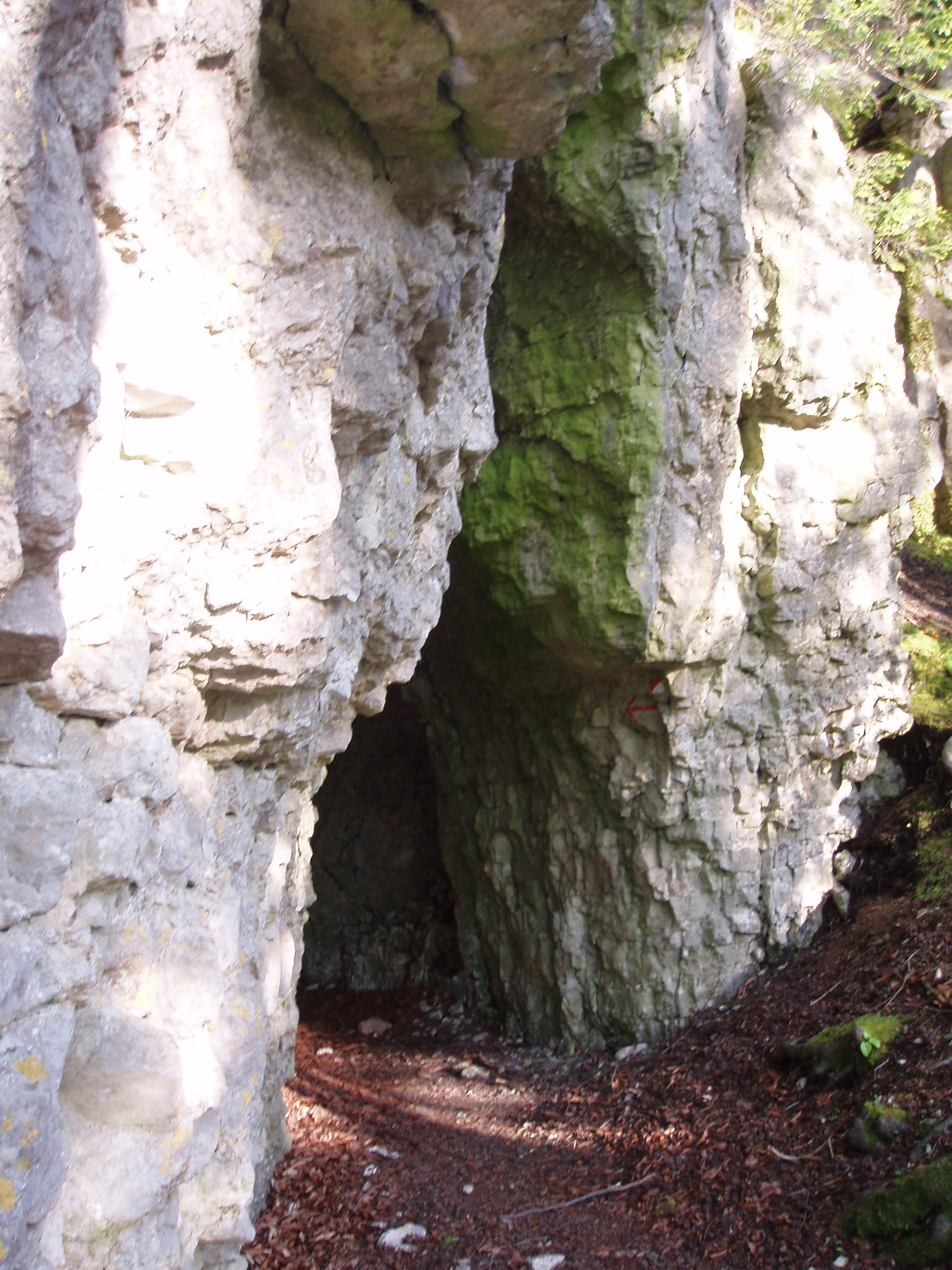 Eingang zu einem Felsengang im ehemaligen Park von Schloss Greifenstein